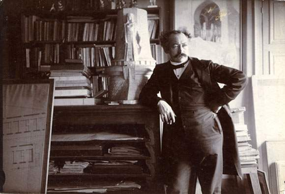 Dornac, René Binet (1866-1911), vers 1900, épreuve d'époque sur papier citrate, 12x17,4 cm, mention à la mine de plomb au dos : «Binet architecte», Paris, collection particulière.